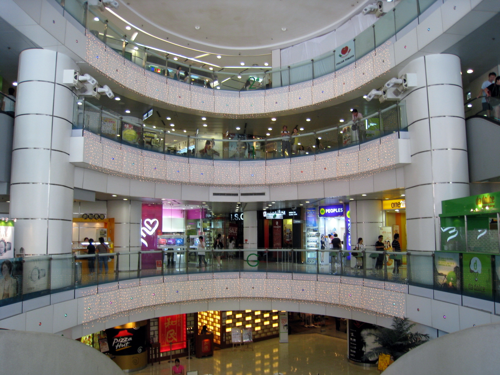 HK Pioneer Centre Void 始創中心中庭